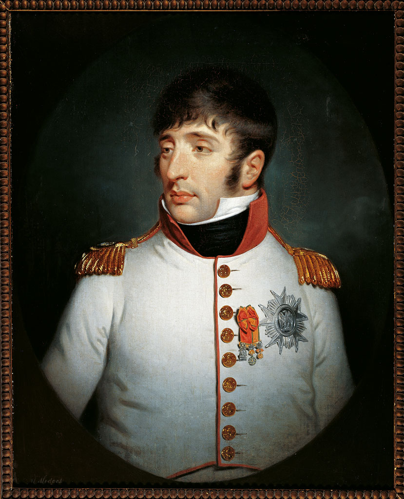 schilderij; mansportret; Lodewijk Napoleon Bonaparte